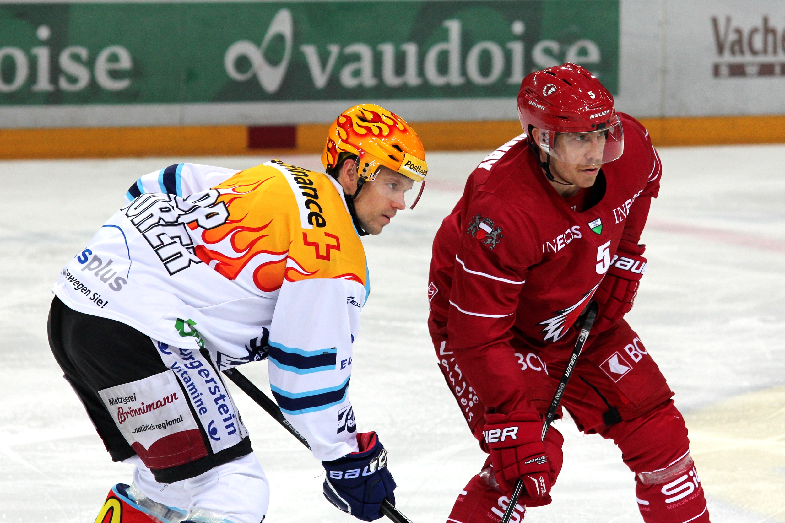 Nicklas Danielsson (RJ 44, TS), Colby Genoway (L 5).